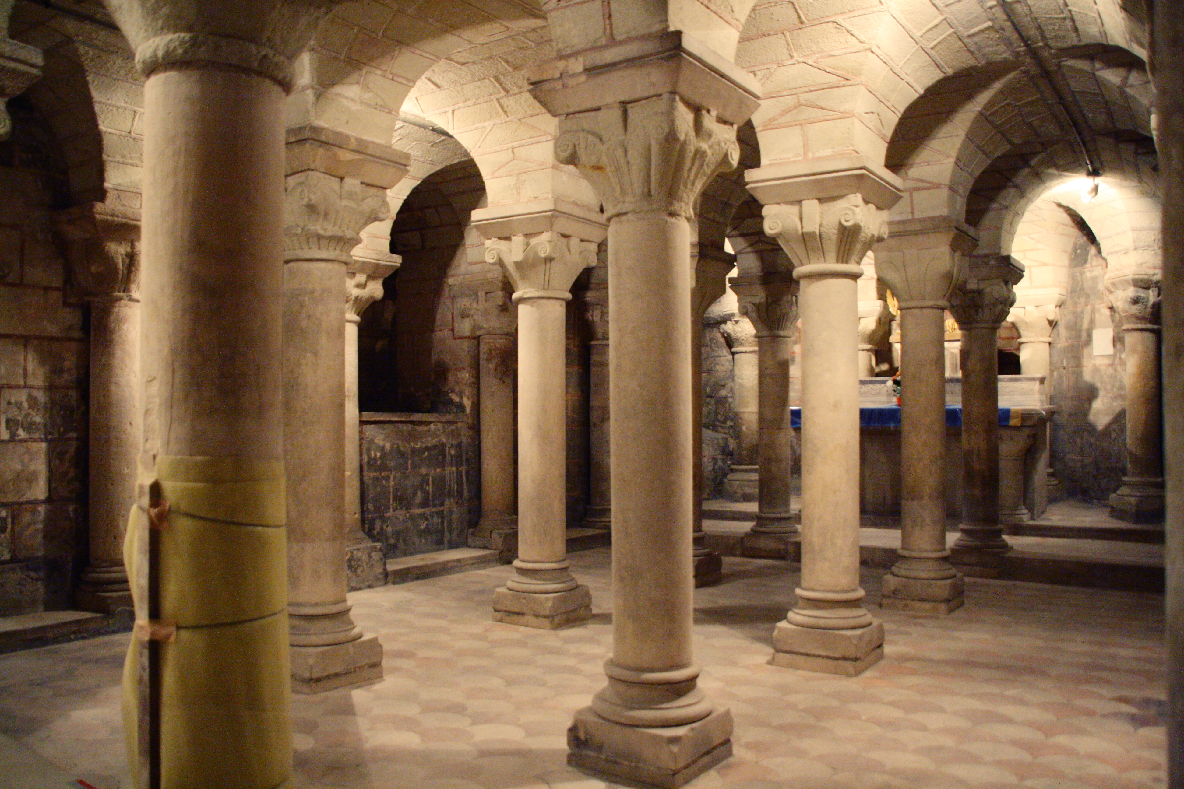 Crypte de l'église de la Trinité et de l'abbaye du Ronceray, Angers, France.